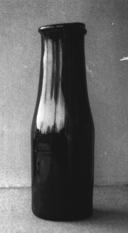 Bouteille a conserve époque Appert, collection Jean-Paul Barbier, musée Châlons en Champagne salle Appert